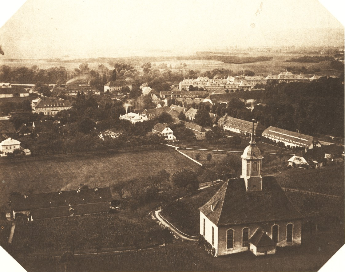 Blick auf die Weinbergkirche in Pillnitz